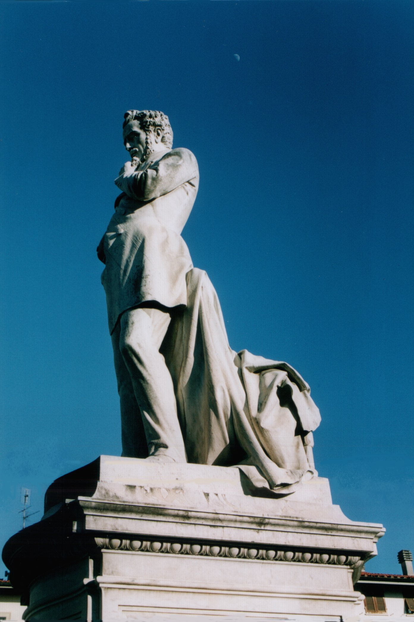 Monumento a Giuseppe Giusti, nella piazza di Monsummano Terme (PT, Italy) a lui intitolata